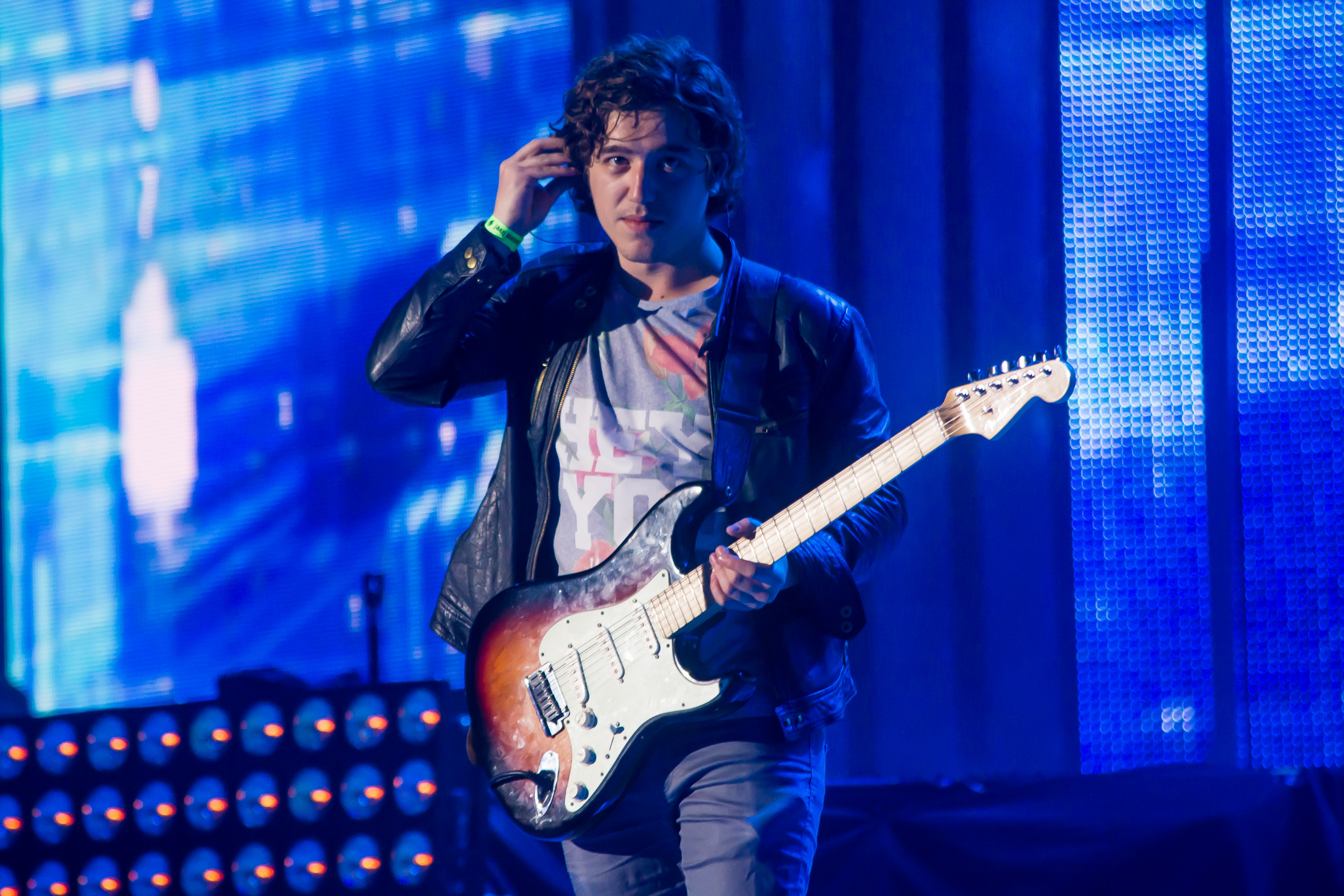 Janieck Devy на Europa Plus TV. Hit Non Stop в Витебске 2016